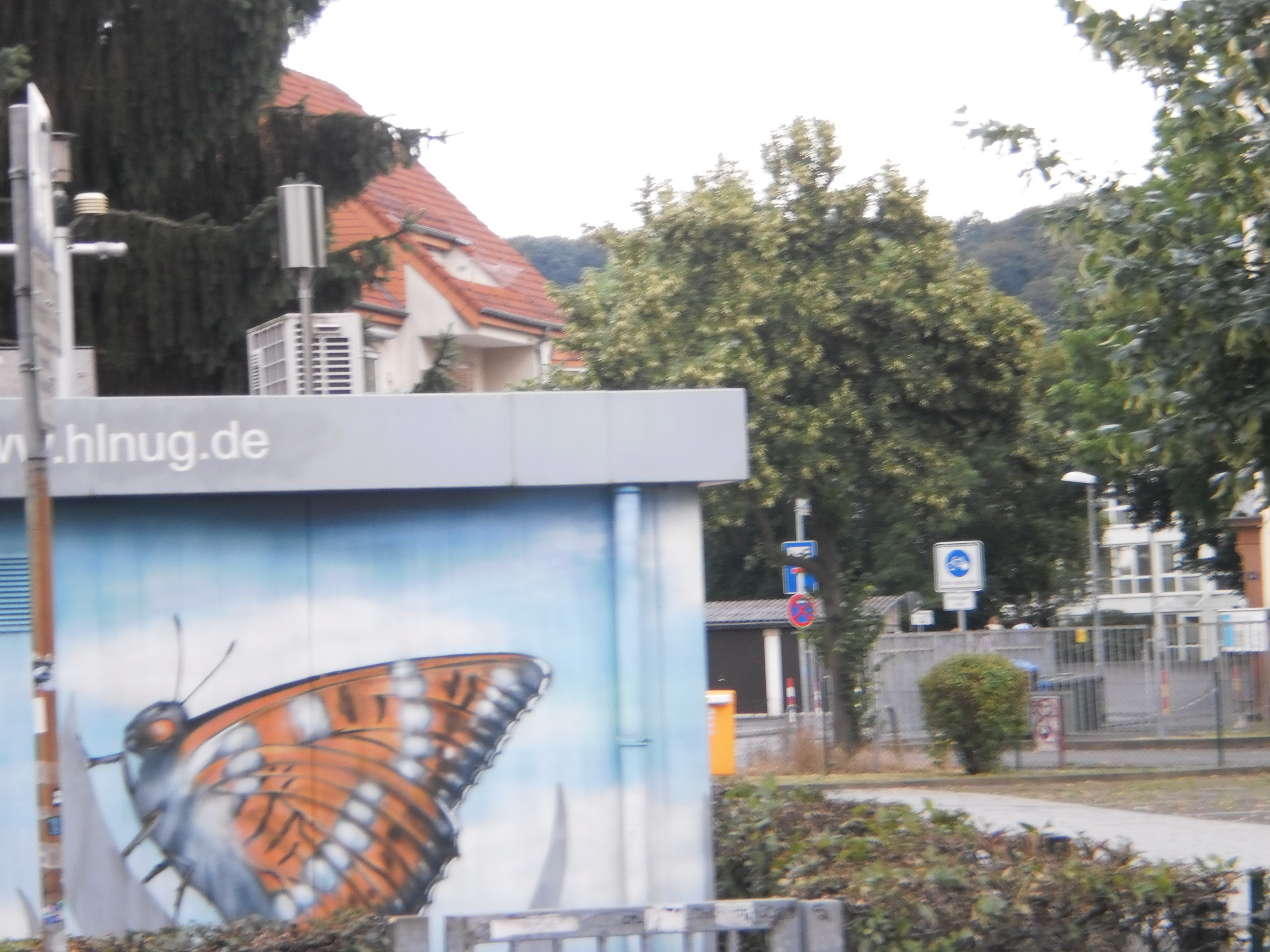 Die Luftmessstation in der Gutenbergstrasse mit einem Ausblick zur ersten Fahrradstrasse in Marburg "Auf der Weide", die etwas unscheinbar im Hintergrund beginnt und dann mit dem neuen Hirsefeldsteg die Lahn quert. Externer Link mit aktuellen Messwerten: hlnug.de (Luftmessnetz Hessen).